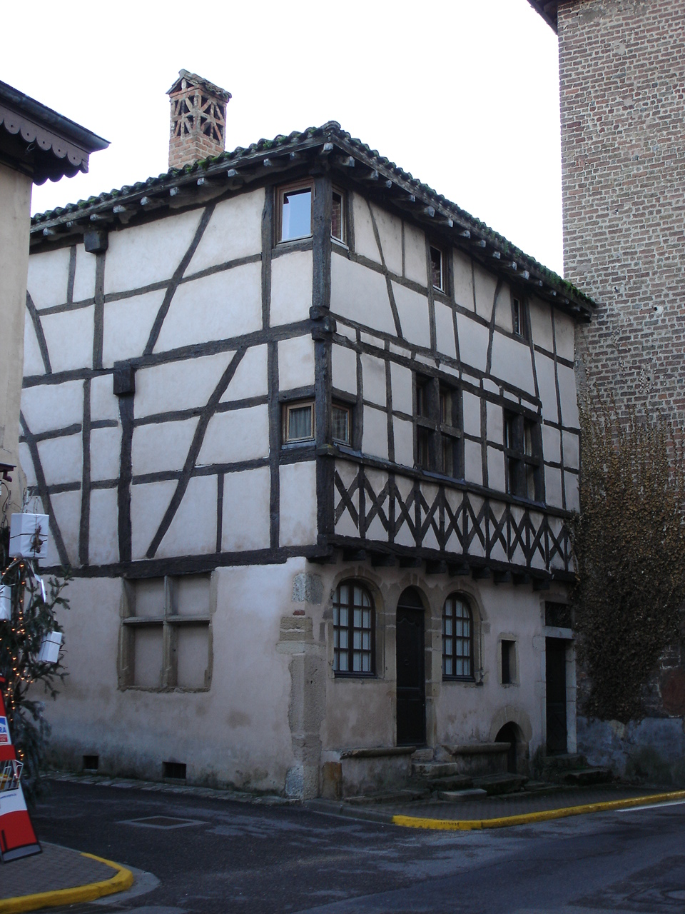 La maison du guetteur Pont de Veyle